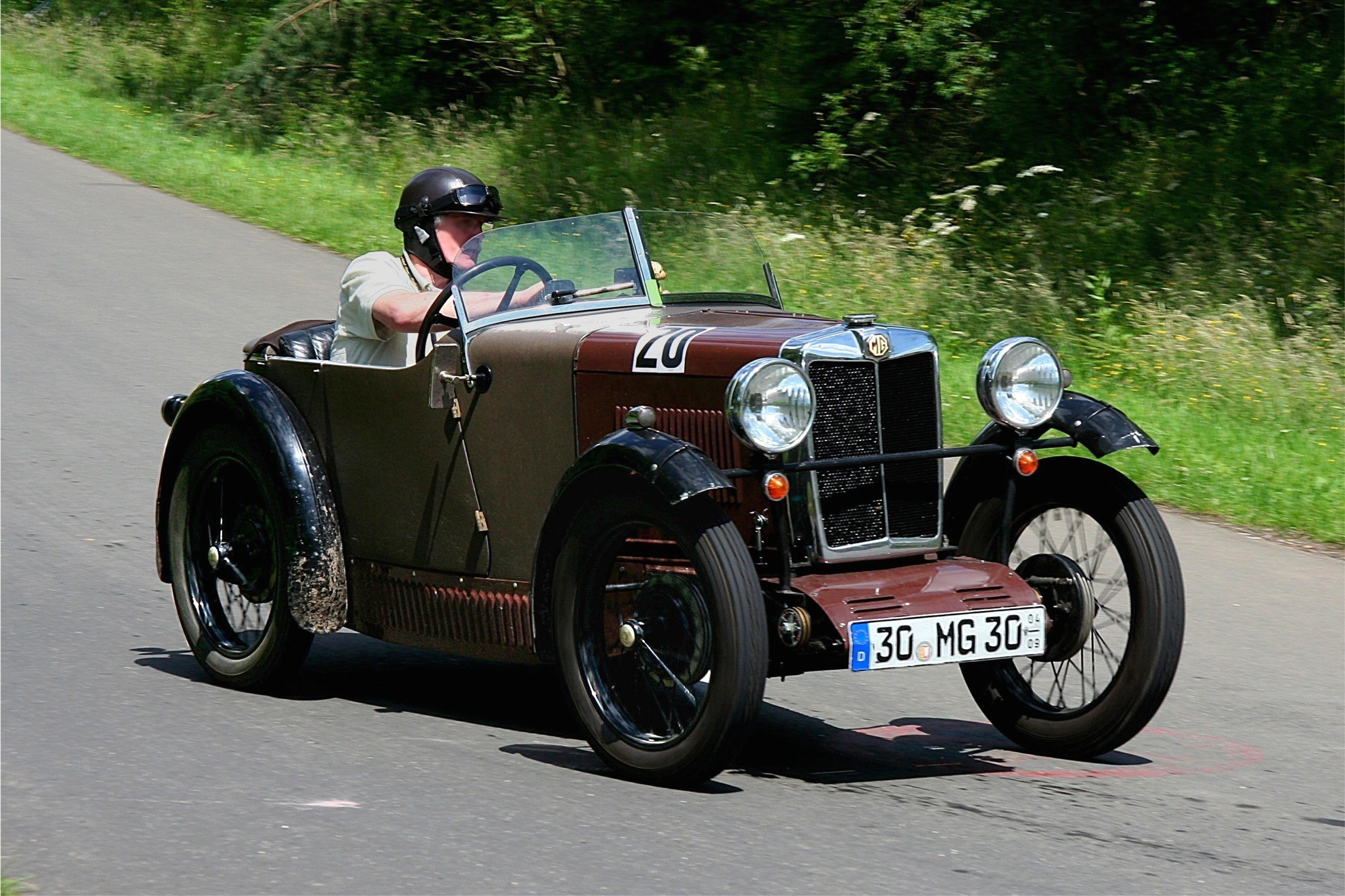 MG M-Type, Baujahr 1930, auf der historischen Südschleife des Nürburgrings